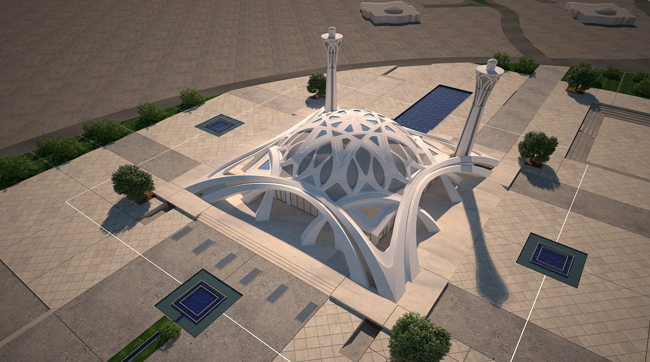 آنچه که در گذر از عهد قدیم به عصر جدید رخ داده است، سبک شدن معماری است. مقایسه چهارتاقی نیاسر (دوره ساسانی) که گنبد بر پایه های ضخیم استوار شده است و مسجد جامع عباسی اصفهان، به خوبی گواه این است که به مرور زمان، معماران در پوشش دهانه ها به دنبال راه هایی برای سبک کردن حجم بودند. یکی از روش های سبک سازی دهانه های بزرگ و گنبدها، تبدیل مربع به دایره و استفاده از ترک است که نمونه ای از آن را می توان در گنبد خواجه نظام الملک مسجد جامع اصفهان (دوره سلجوقی) دید. ویژگی تکاملی معماری ایران در دوره معاصر تجرید است. معماری معاصر با حفظ ویژگی های بنیادی خود در جهت انتزاعی شدن پیش رفت. نظیر مقبره بوعلی سینا (1367 ه.ش) که نمونه تجرید شده گنبد قابوس بن وشمگیر (375 ه.ش) است. تجرید در معماری معاصر را در معماری مساجد خارج از ایران هم شاهد هستیم. در آفرینش فرم مسجد مرکز همایش های بین المللی اصفهان، از گنبد به عنوان عنصر نمادین معماری ایرانی و اسلامی الهام گرفته شده است ضمنا به جهت قرارگیری در مرکز همایش های بین المللی، طرح با فرم سالن اجلاس قرابت دارد. گنبد بر پایه ی مربع شکل به روش تبدیل مربع به دایره و با استفاده از ترکهایی با الهام از نقوش اسلیمی و با رعایت اصل تجرید بنا شده است. در شکل گیری گنبدخانه سعی شد که خلوص مکعب گنبدخانه حفظ شود. مسجد در جهت قبله چرخیده و گنبدخانه با چهار ایوان که از عناصر معماری مناطق کویری بوده احاطه شده است.